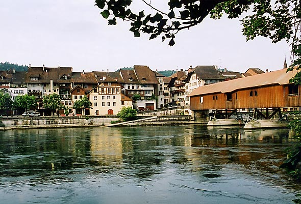 Büren an der Aare: Altstadt mit Holzbrücke